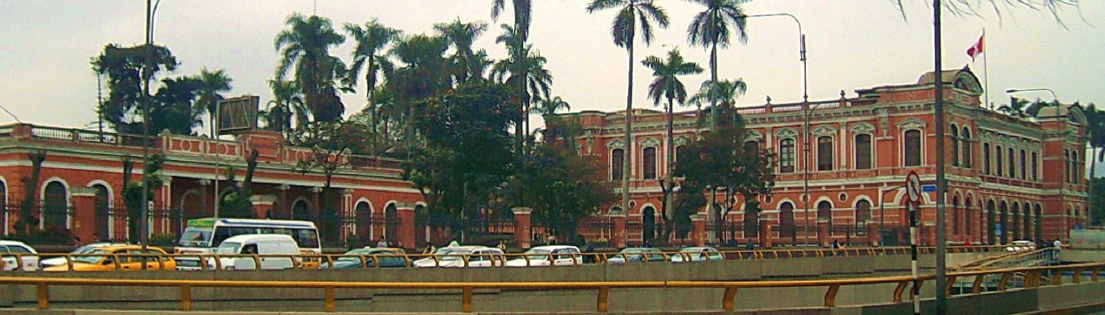 Campus de la Facultad de Medicina "San Fernando" de la Universidad Nacional Mayo de San Marcos, Lima, Peru.